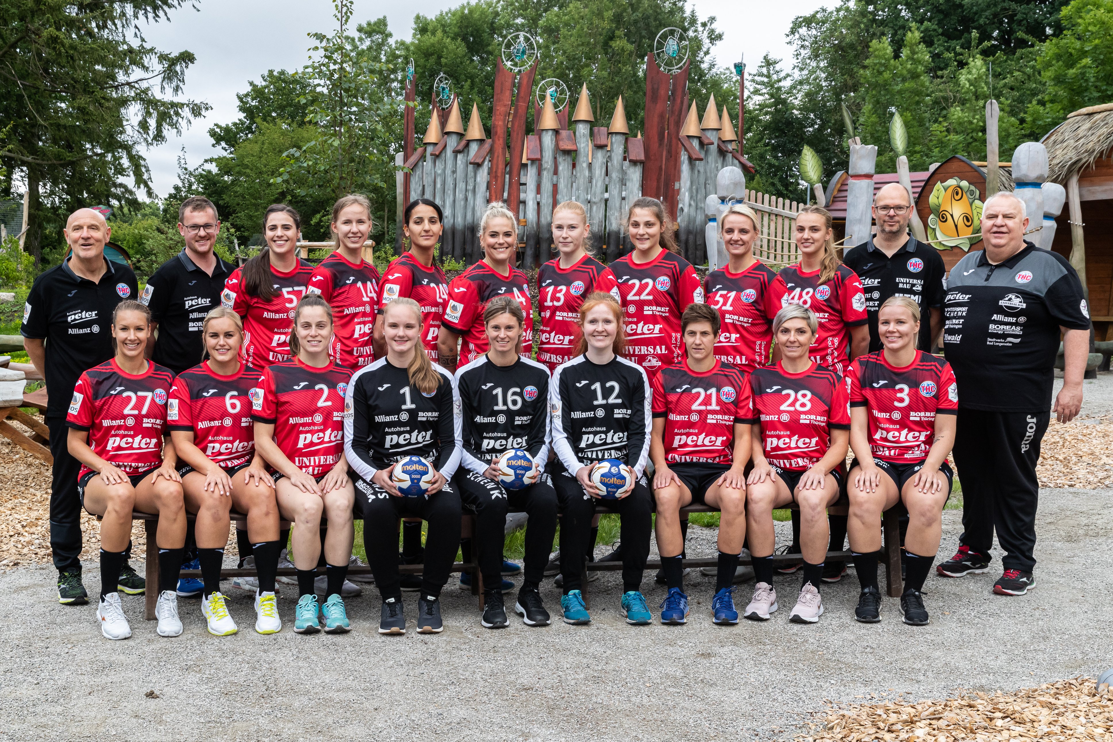 Handball, 1. Bundesliga Frauen, Thüringer HC, Teamfotos; Mannschaftsfoto, team photo Thüringer HC